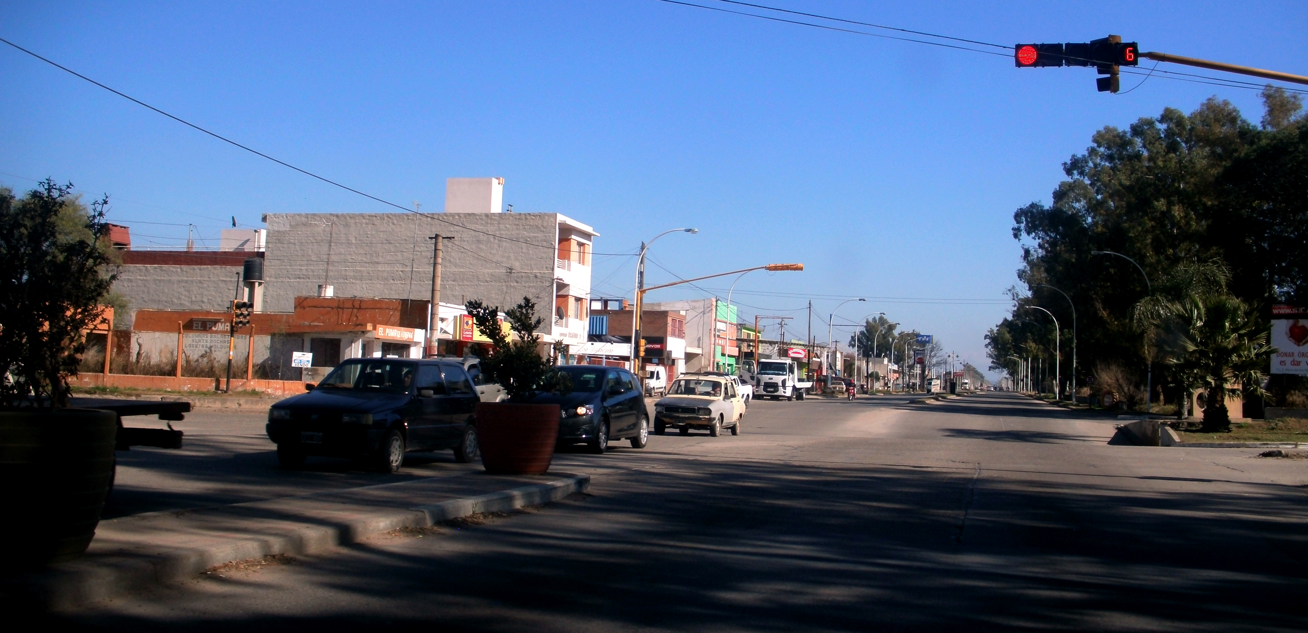 Av. Gral. Savio, en la zona oeste de la ciudad de Río Tercero.